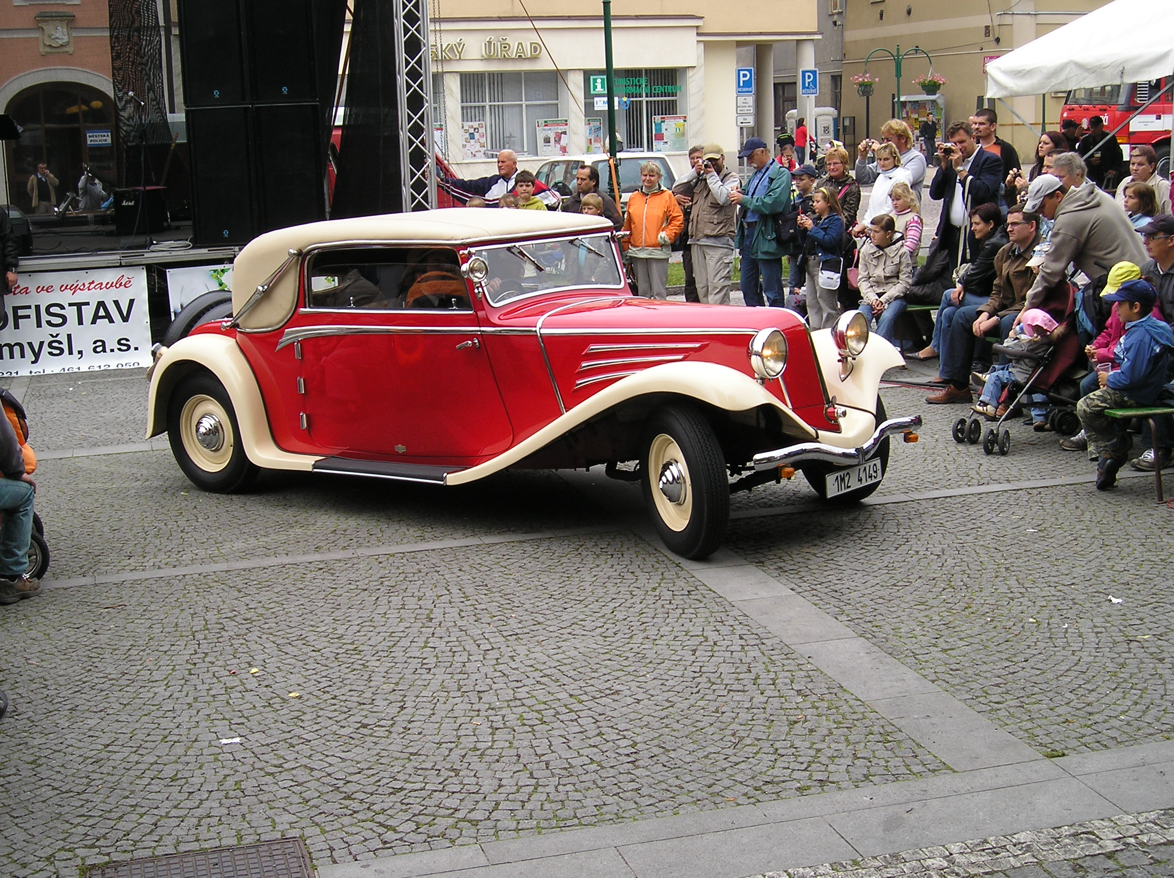 Tatra 52 with Sodomka bodywork